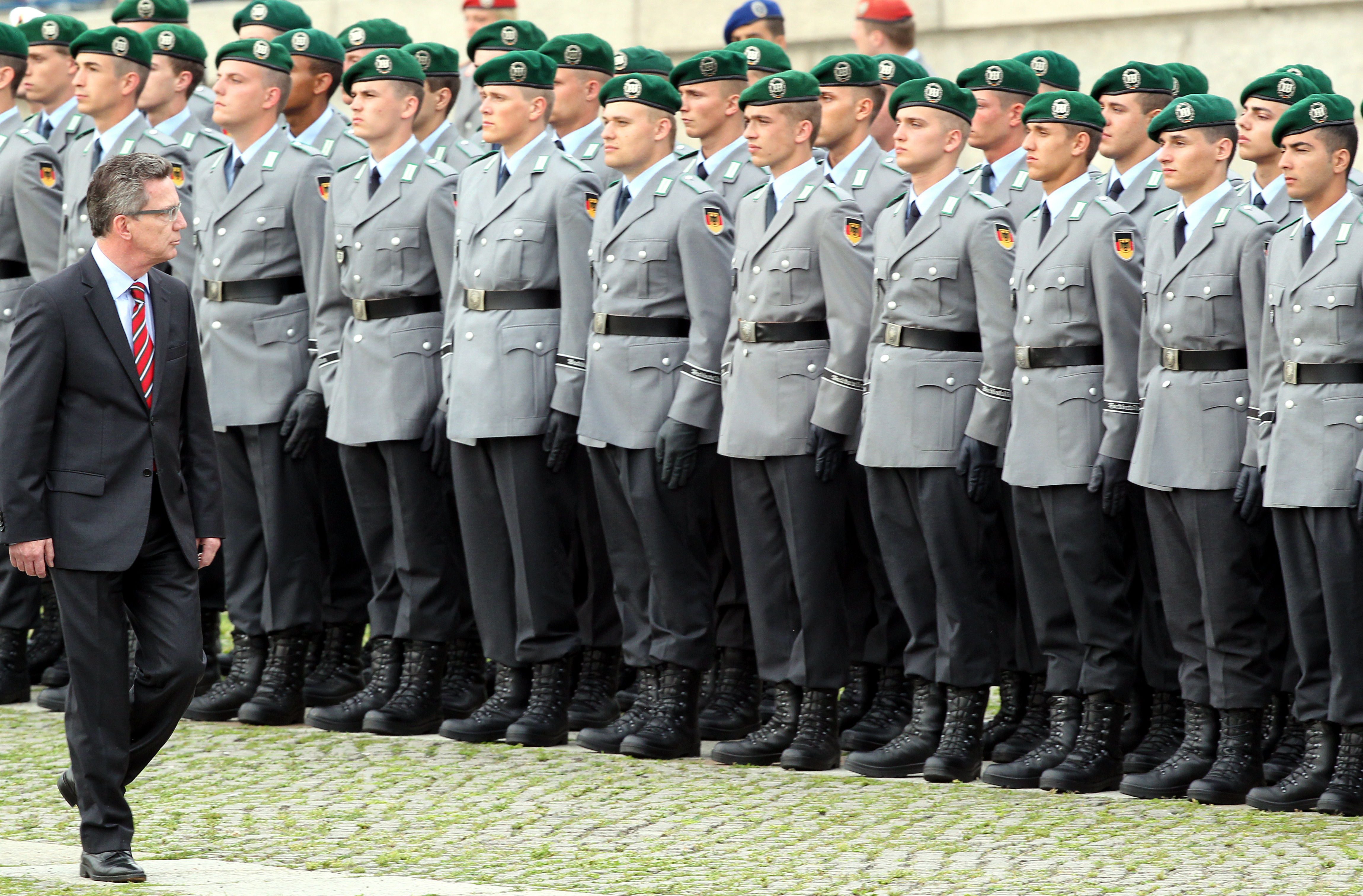 Министр обороны Германии Томас дe Мезьер осматривает построение новобранцев Бундесвера Фото: Wolfgang Kumm dpa